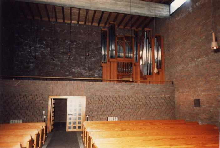 Orgel der Matthäuskirche Hagen